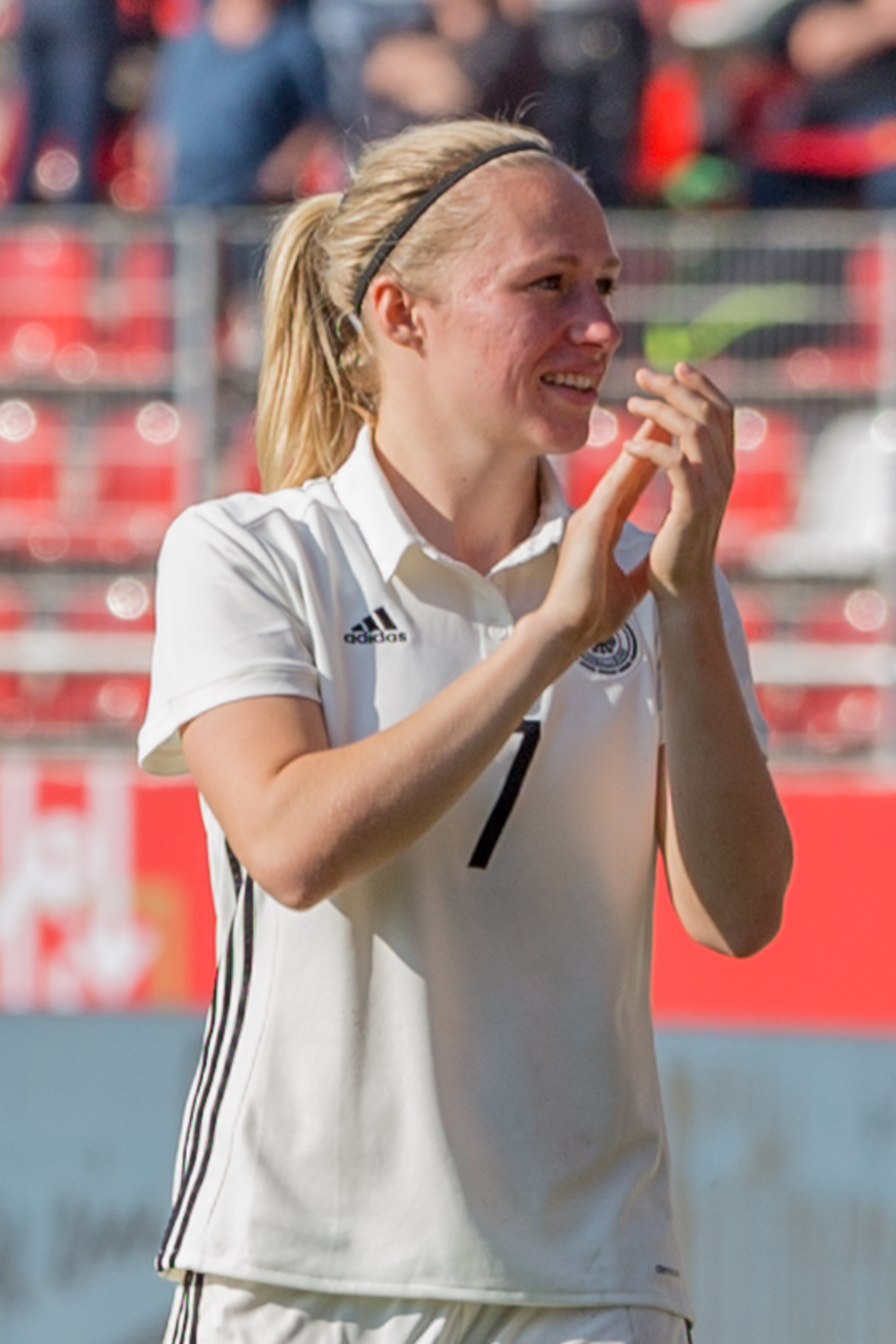 Fußball, Frauen, Länderspiel, Deutschland - Kanada; Pauline Bremer nach Ende des Spiels